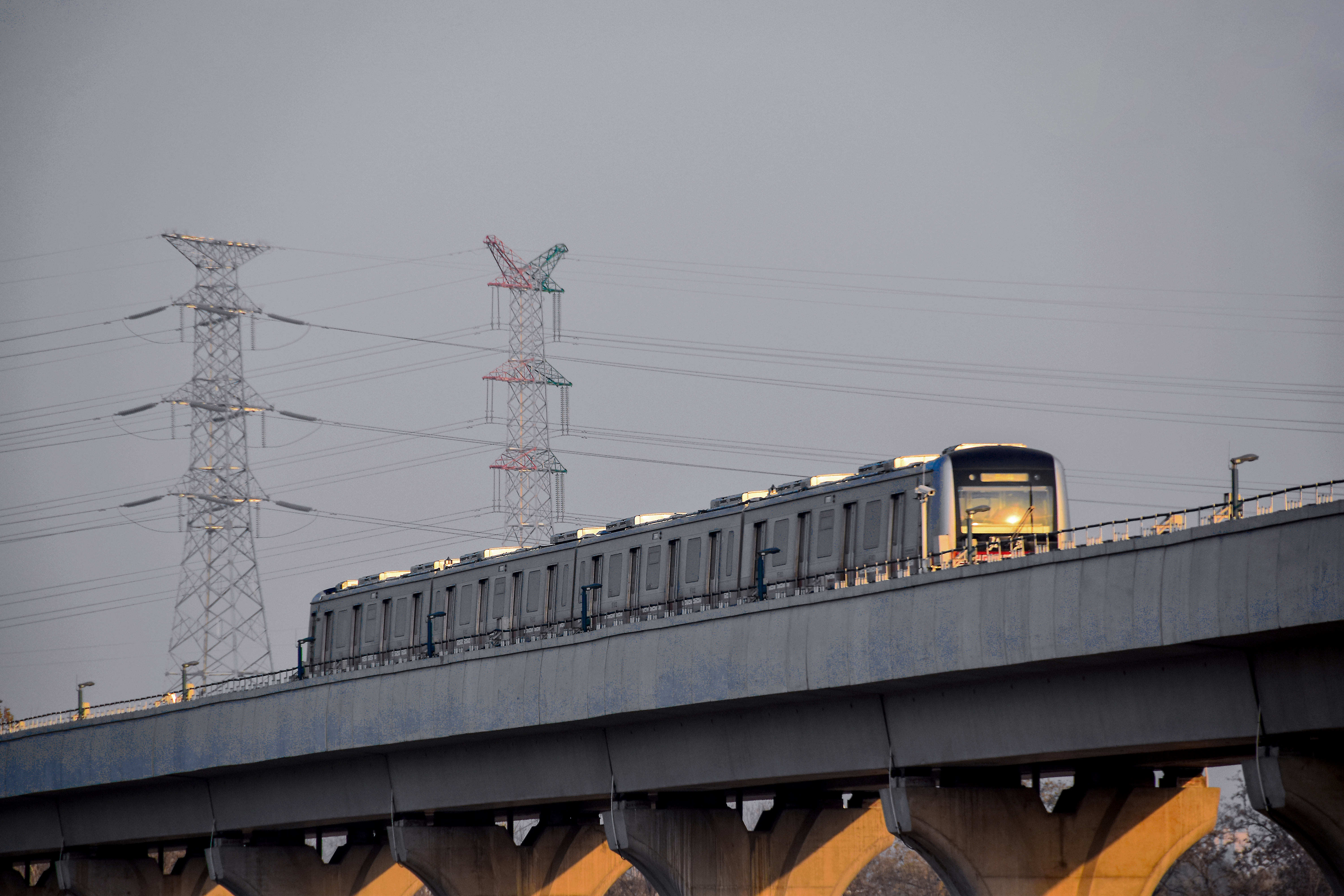 中文（中国大陆）: 燕房线海豚号（YF013）列车即将驶入大石河东站。